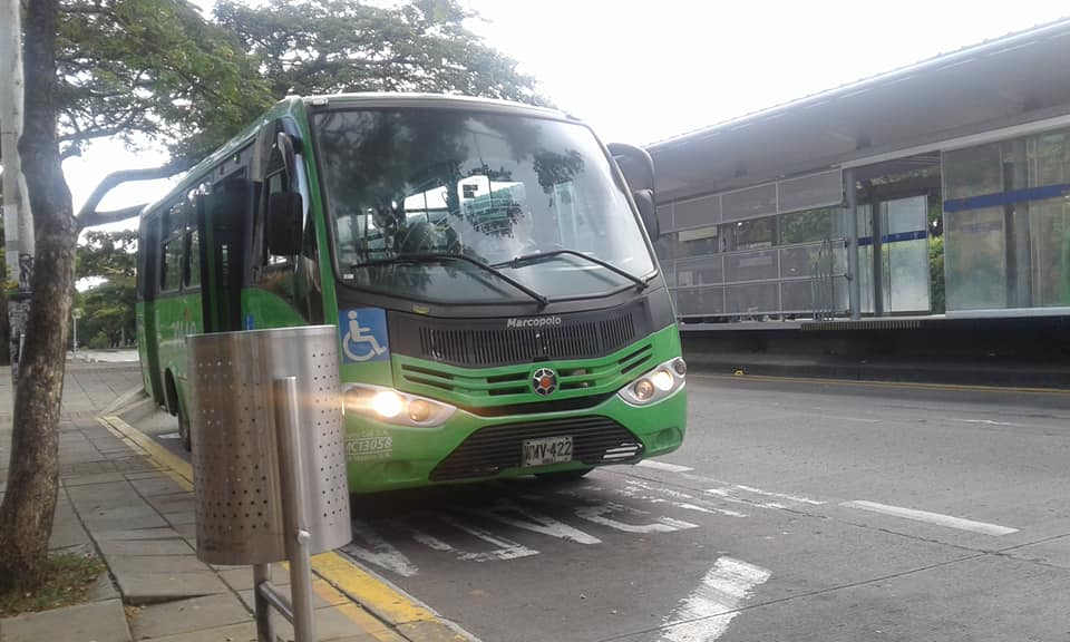 Bus complementaria A12D estacionada en Estación Meléndez (MIO).